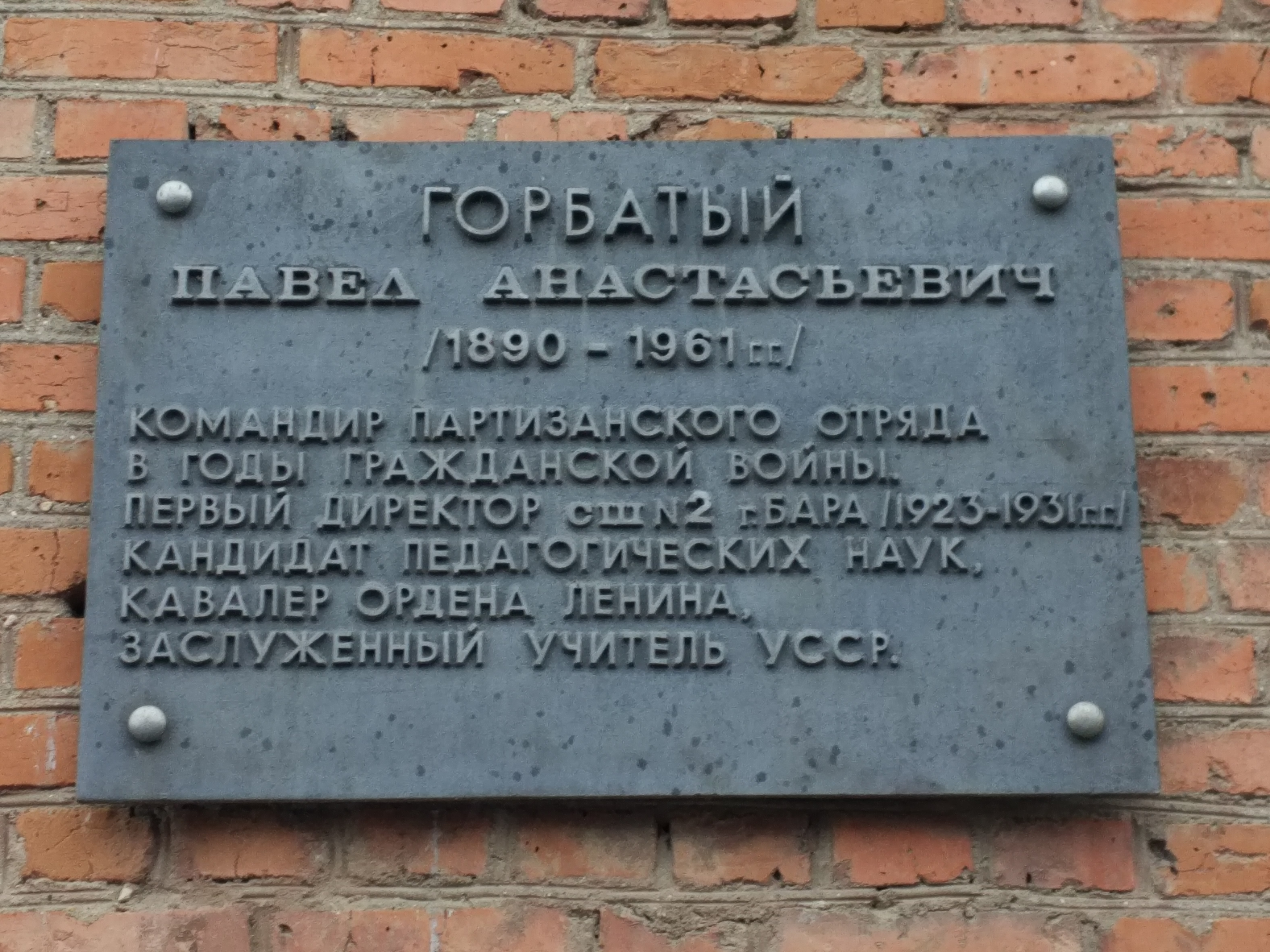 Меморіальна до́шка Горбатий П.А. (Барський ліцей №2)